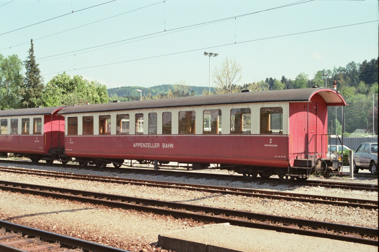 B 241-242 (ex 13-14 ex RhB 2271-72, 1946) der Appenenzellerbahn in Gossau